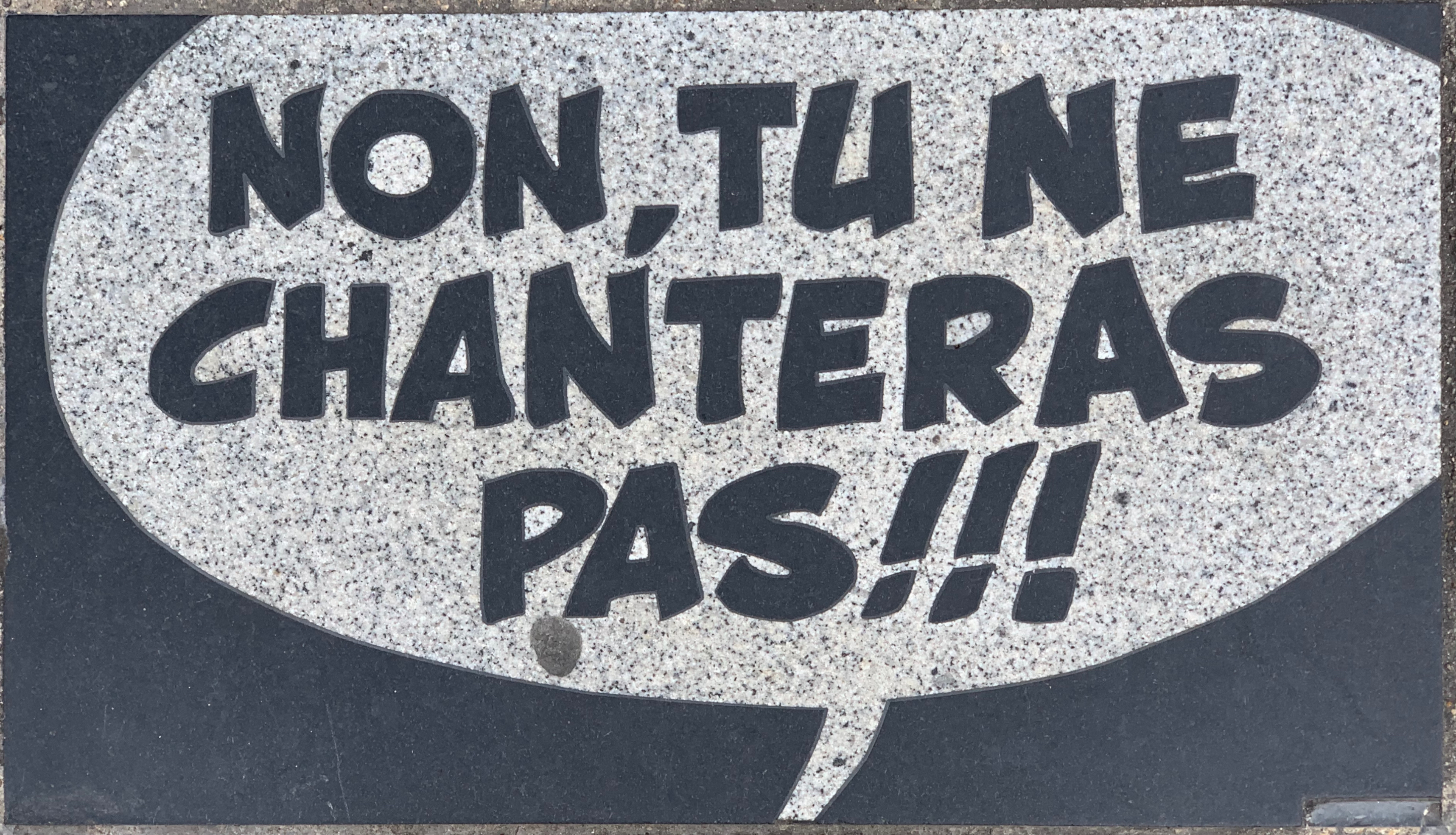 Rue René-Goscinny (Paris) - dalle au sol (non, tu ne chanteras pas !!!) : cette bulle fait référence à la phrase de Cétautomatix quand il empêche (en général avec violence) Assurancetourix de chanter.